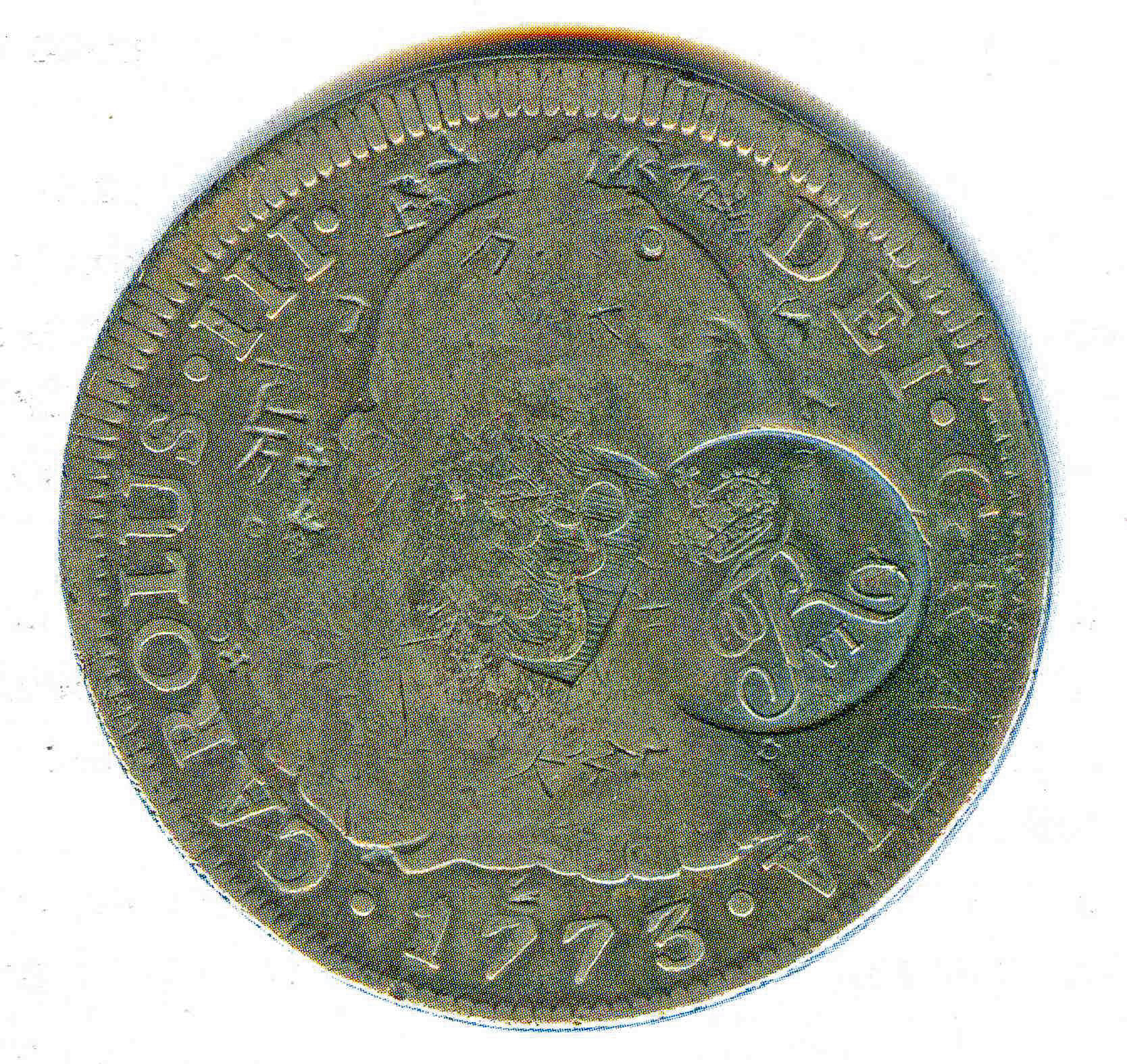 Moneda con resello empleada en la colonias danesas.